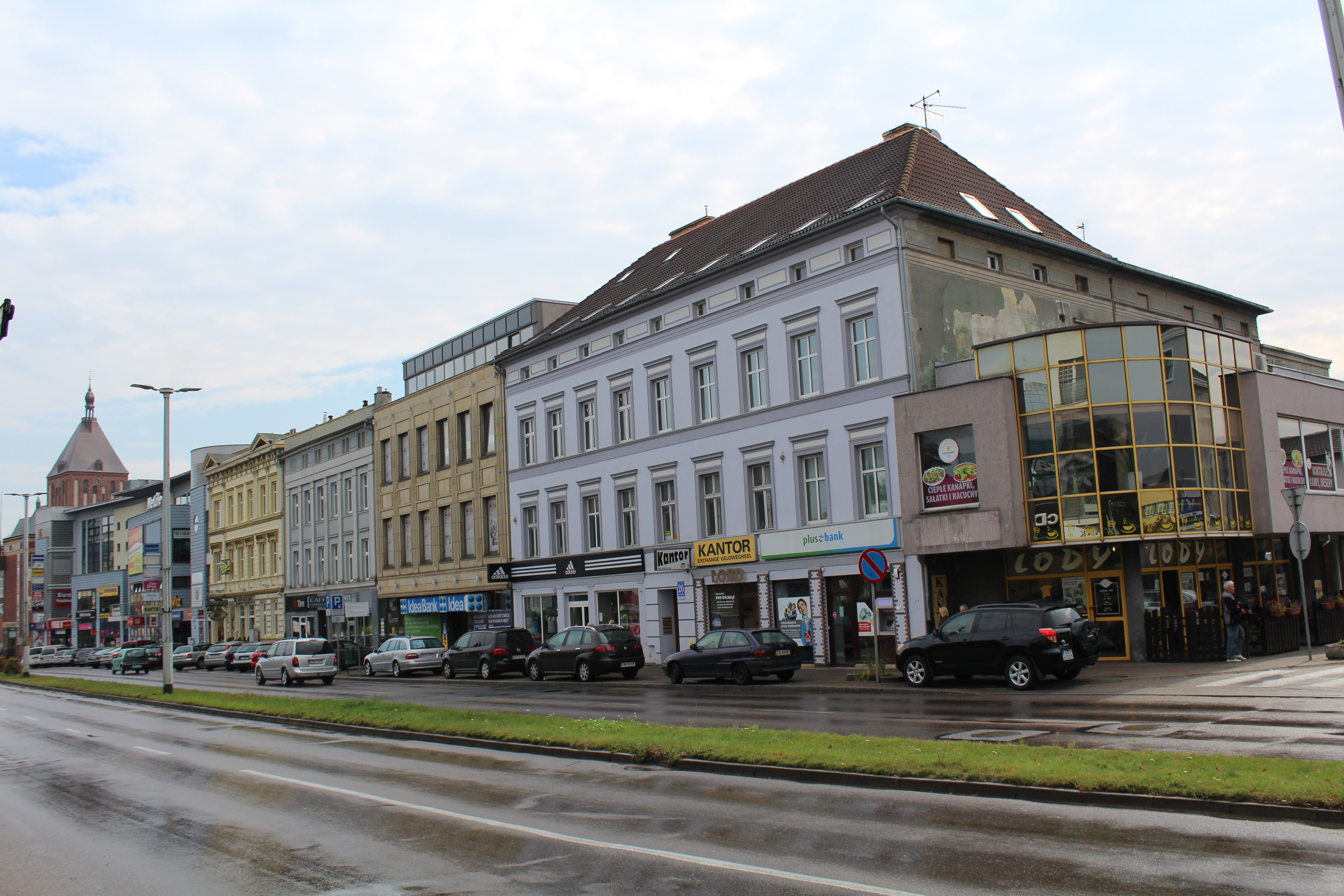 Ulica Zwycięstwa w Koszalinie